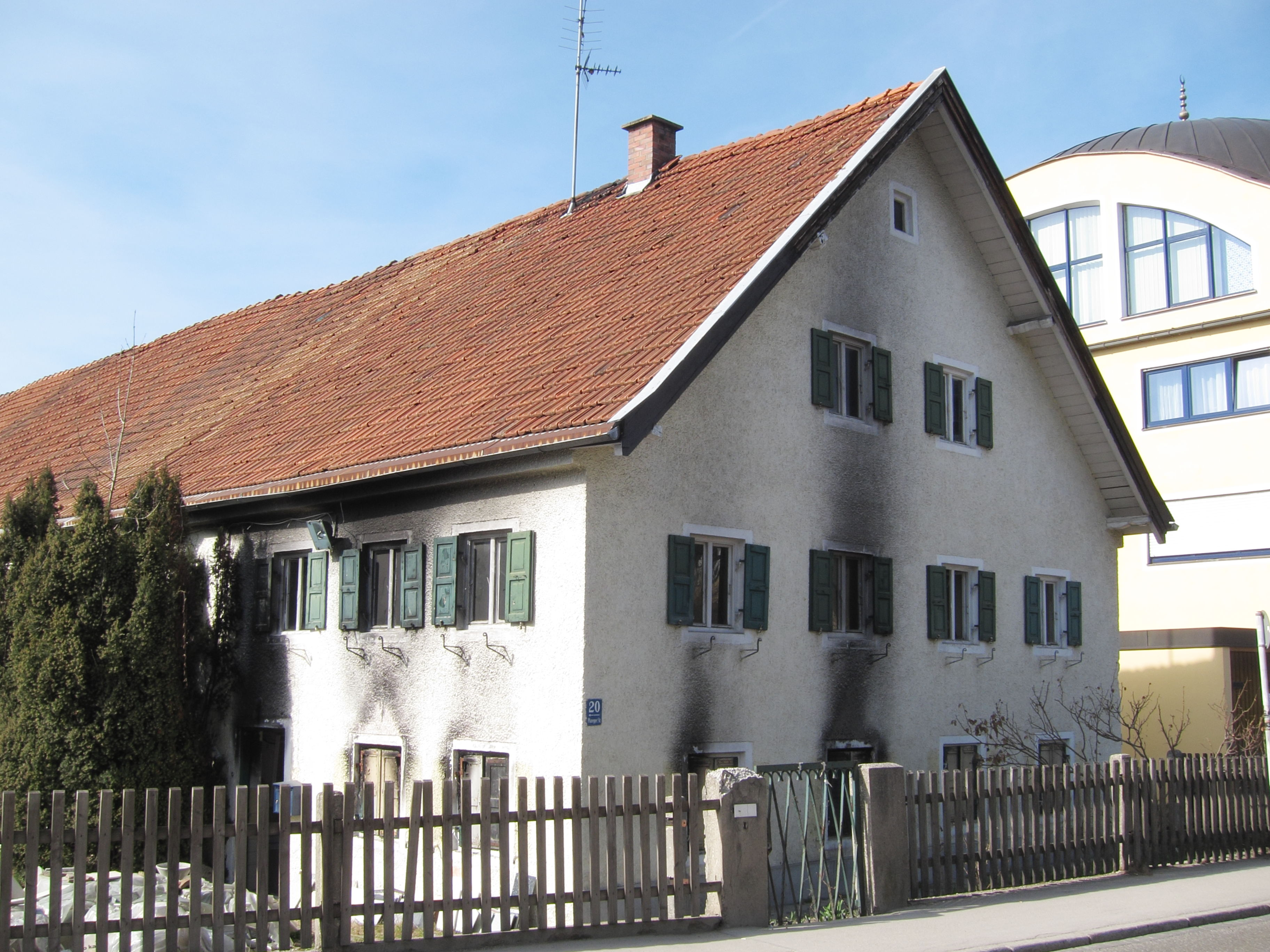 Planegger Straße 20; Zweiseitiger Bauernhof, Wohnhaus wohl 1. Hälfte 19. Jh.